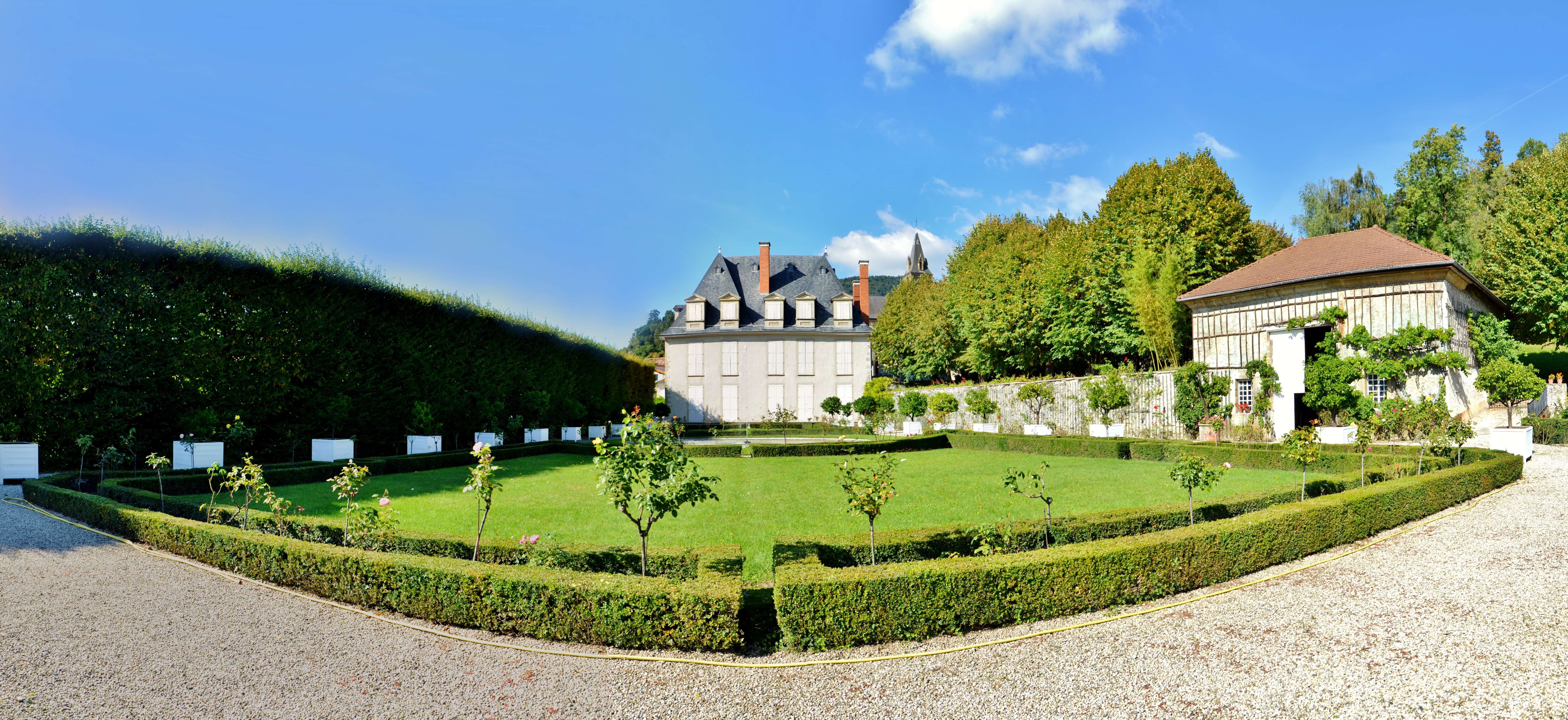 Château de Siéyès (ClasséInscrit) .